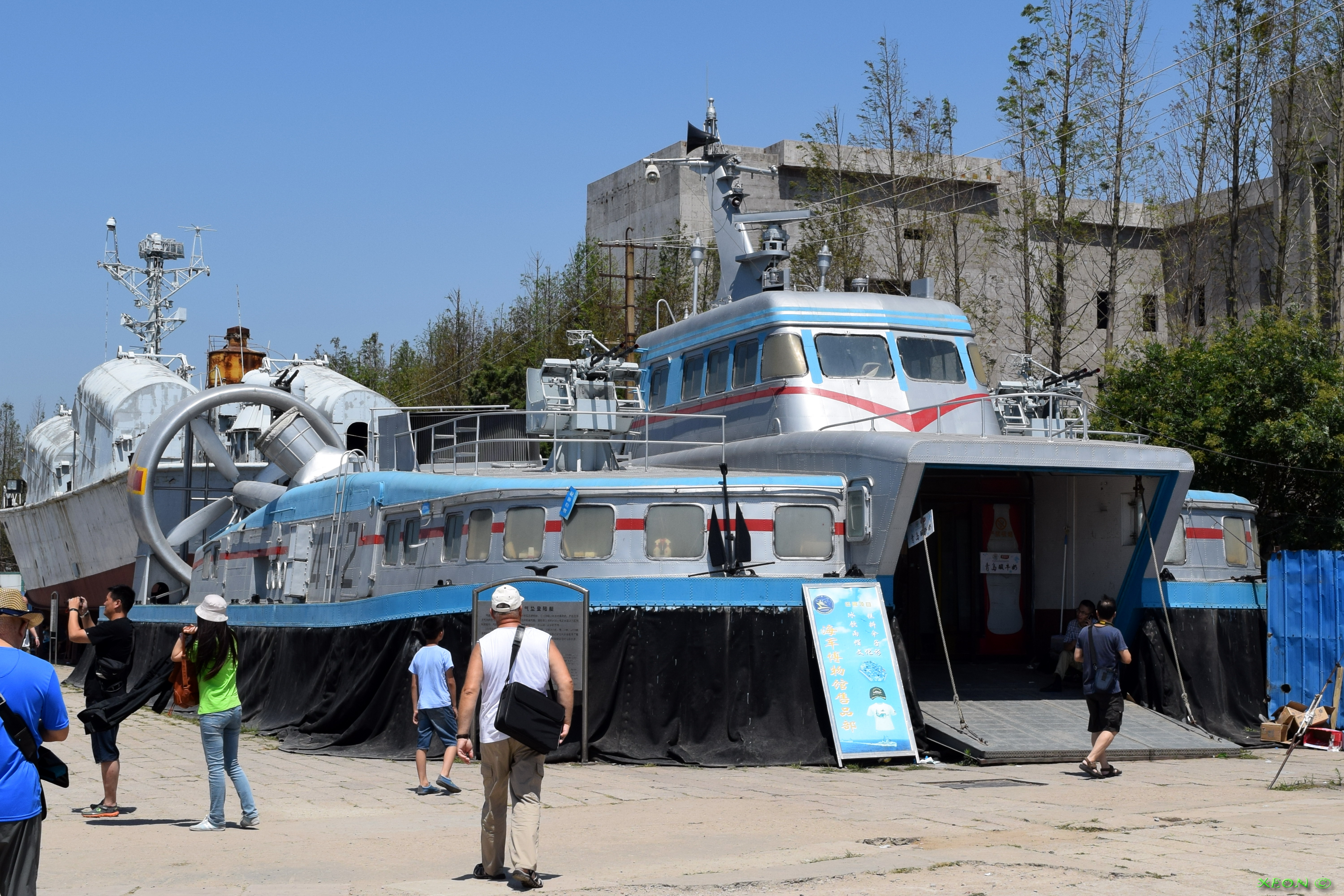 Naval Museum 4中文（中国大陆）: 中国海军博物馆722II型气垫登陆艇452号原型艇，后方为6621型导弹艇3101号